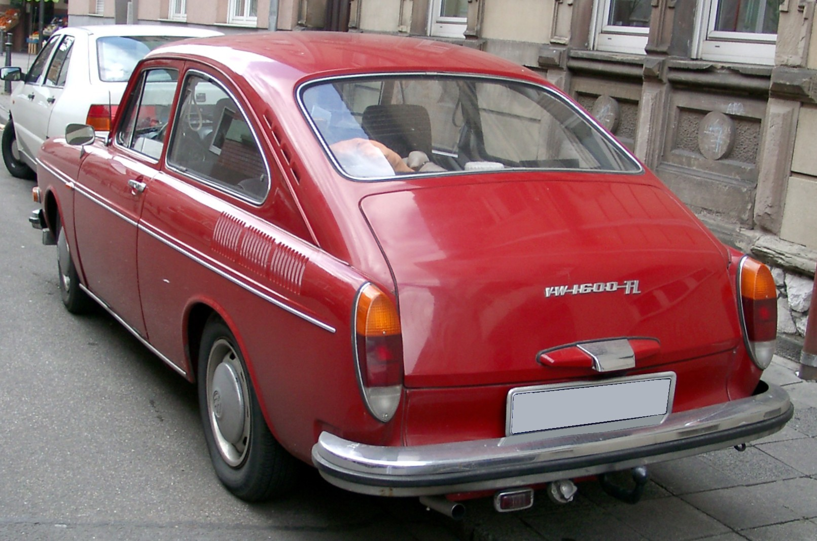 VW Typ 3 (VW 1600 TL)